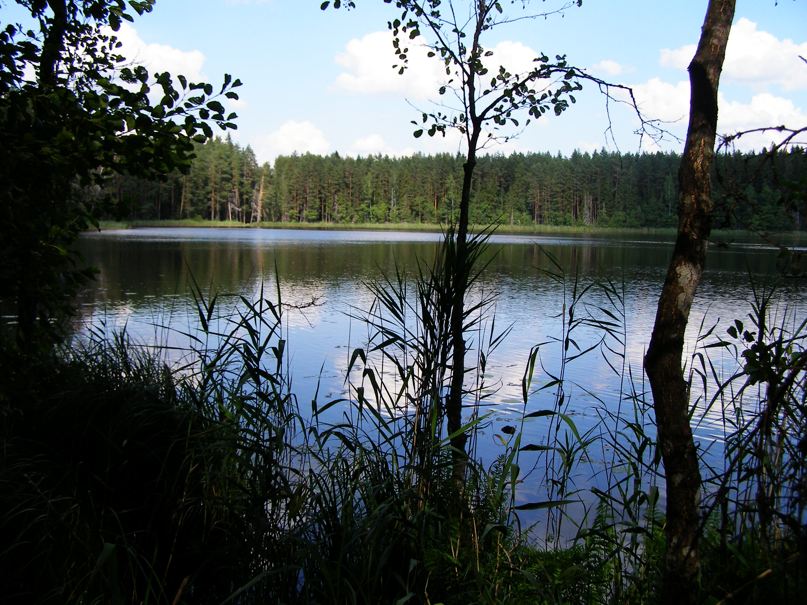 Kallõtõ järv Karulas. Vaade läänest.